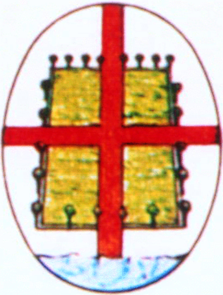 Stemma usato tra il 1920 e il 1945 (periodo italiano) come simbolo cittadino